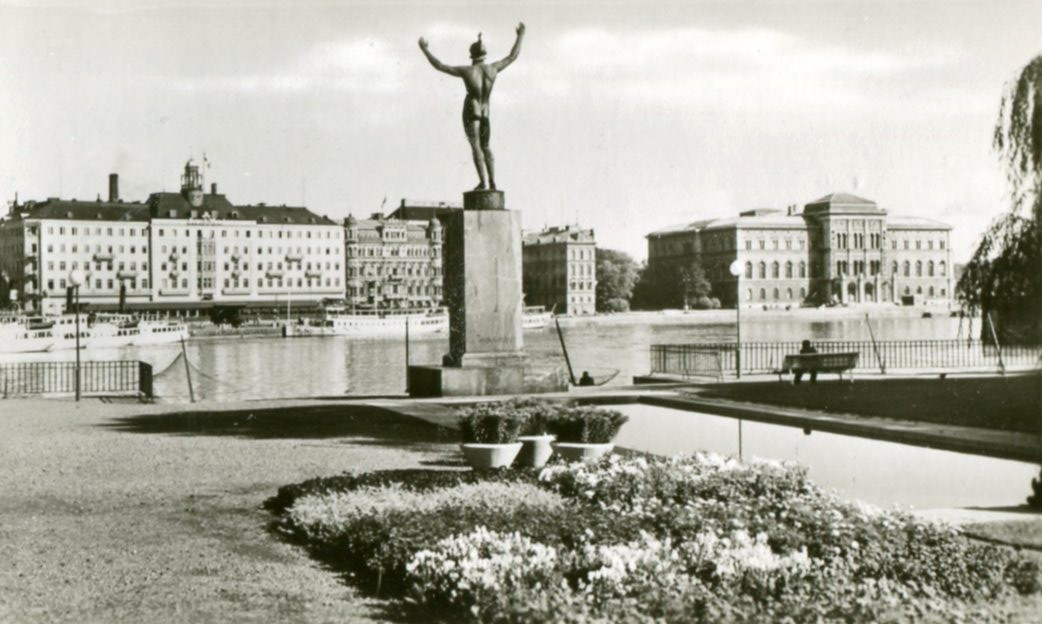 Solsångaren och Strömparterren i Stockholm utgiven och publicerad på 1930-talet av Axel Eliassons Konstförlag